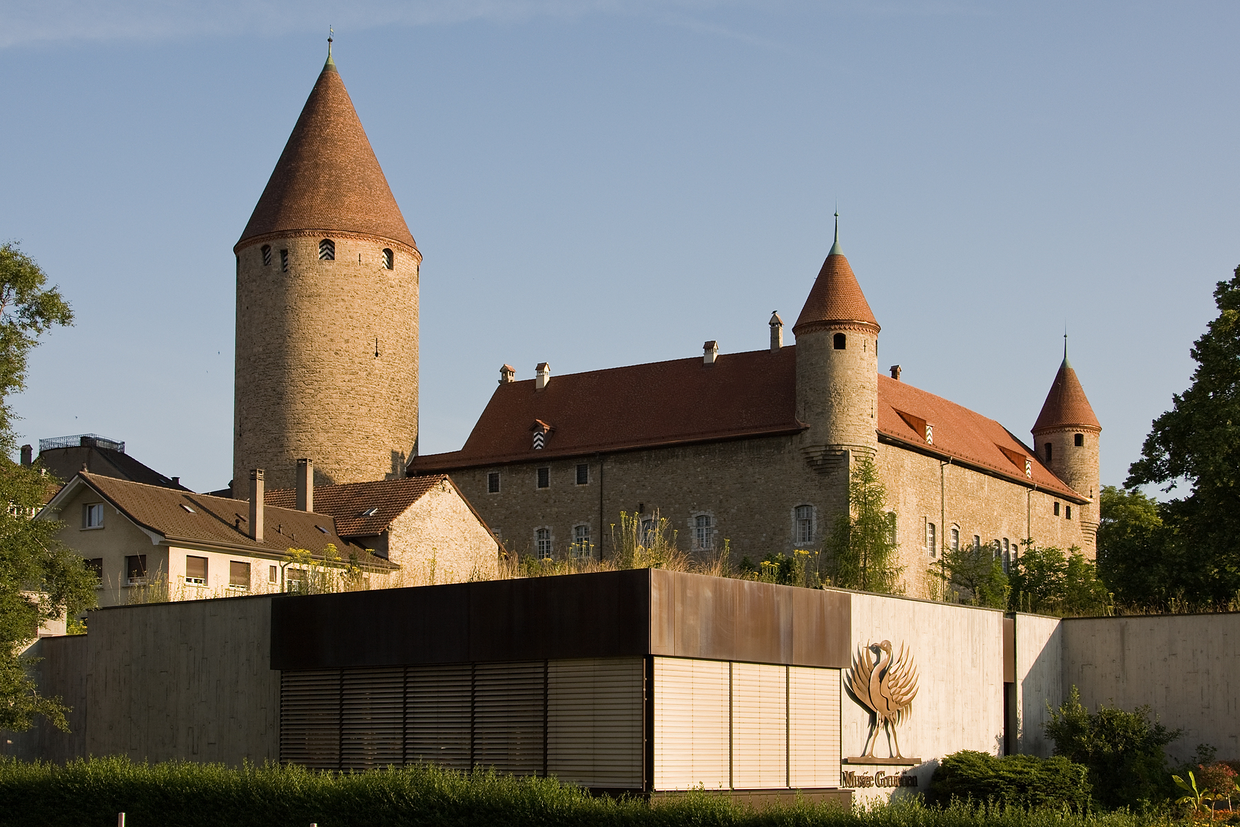 Schloss Bulle und Museum vom Greyerzerland